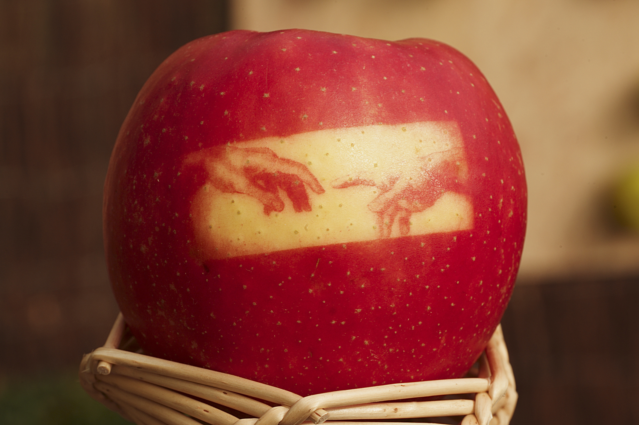 INRA, Jean Weber